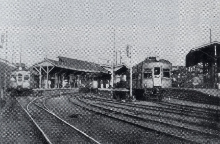 昭和12年ごろの押切町駅